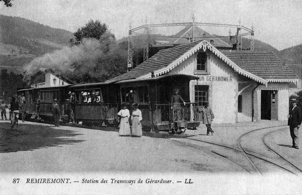 Le tramway de Gérardmer à Remiremont, station de Remiremont au début des années 1900.